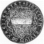 Das erste erhaltene Stadtsiegel von 1437